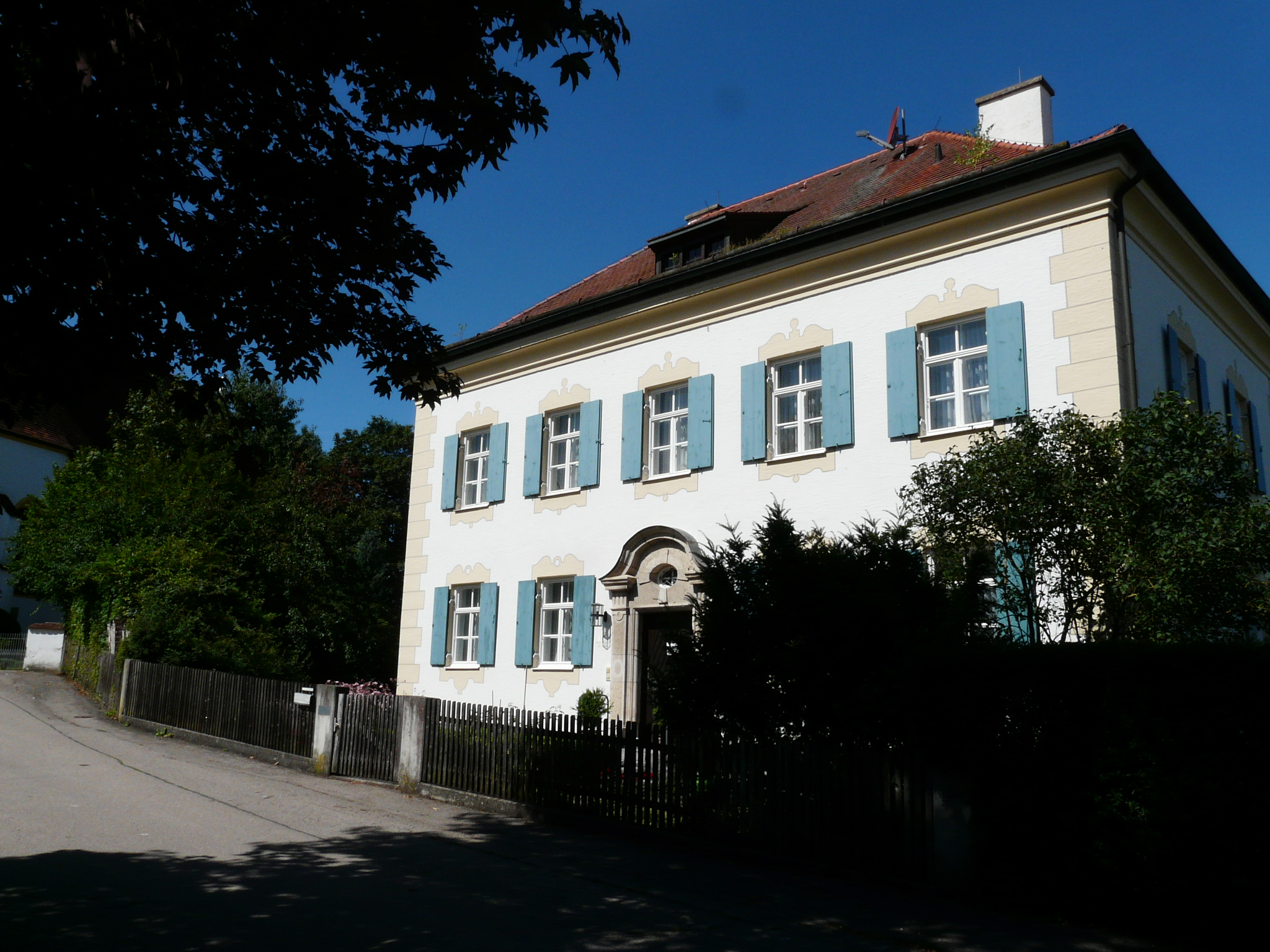 Pfarrhof in Scheuring